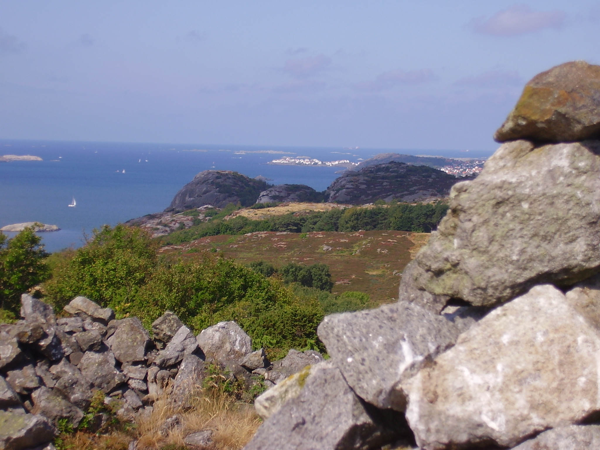 Landskapsvy från ön Älgön utanför den bohusländska kusten.